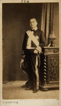 Rafael Bustos y Castilla, fotografía de J. Laurent. Museo de Historia de Madrid